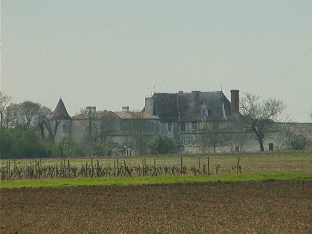 Vue du château de Théon en hiver